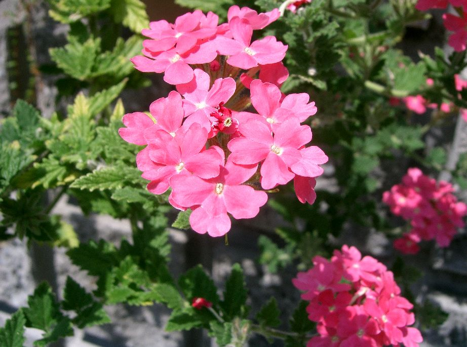 Verbena hybrida cv. Hanatemari